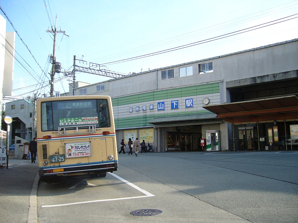 能勢電鉄山下駅